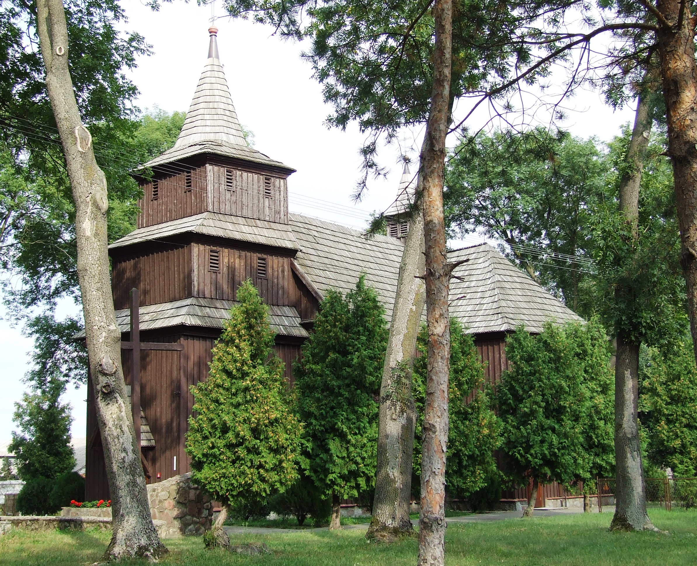 Kamieniec - drewniany kościół parafialny pw. św. Jakuba z lat 1772-1724, 1902, 1948 (zabytek nr A/272/1)